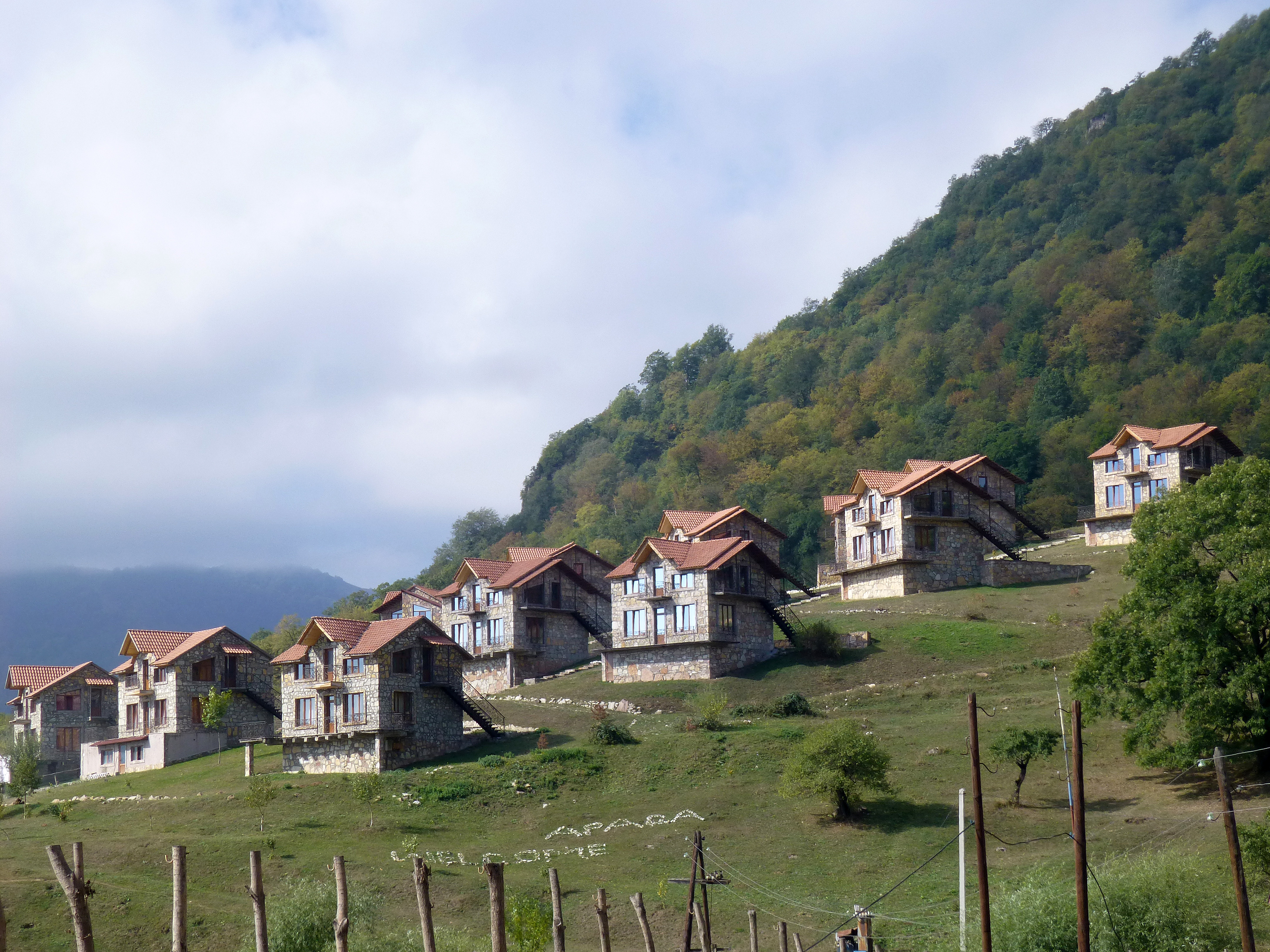 Cottages de vacances datant de l'ère soviétique à Yenokavan (Tavush, Arménie).